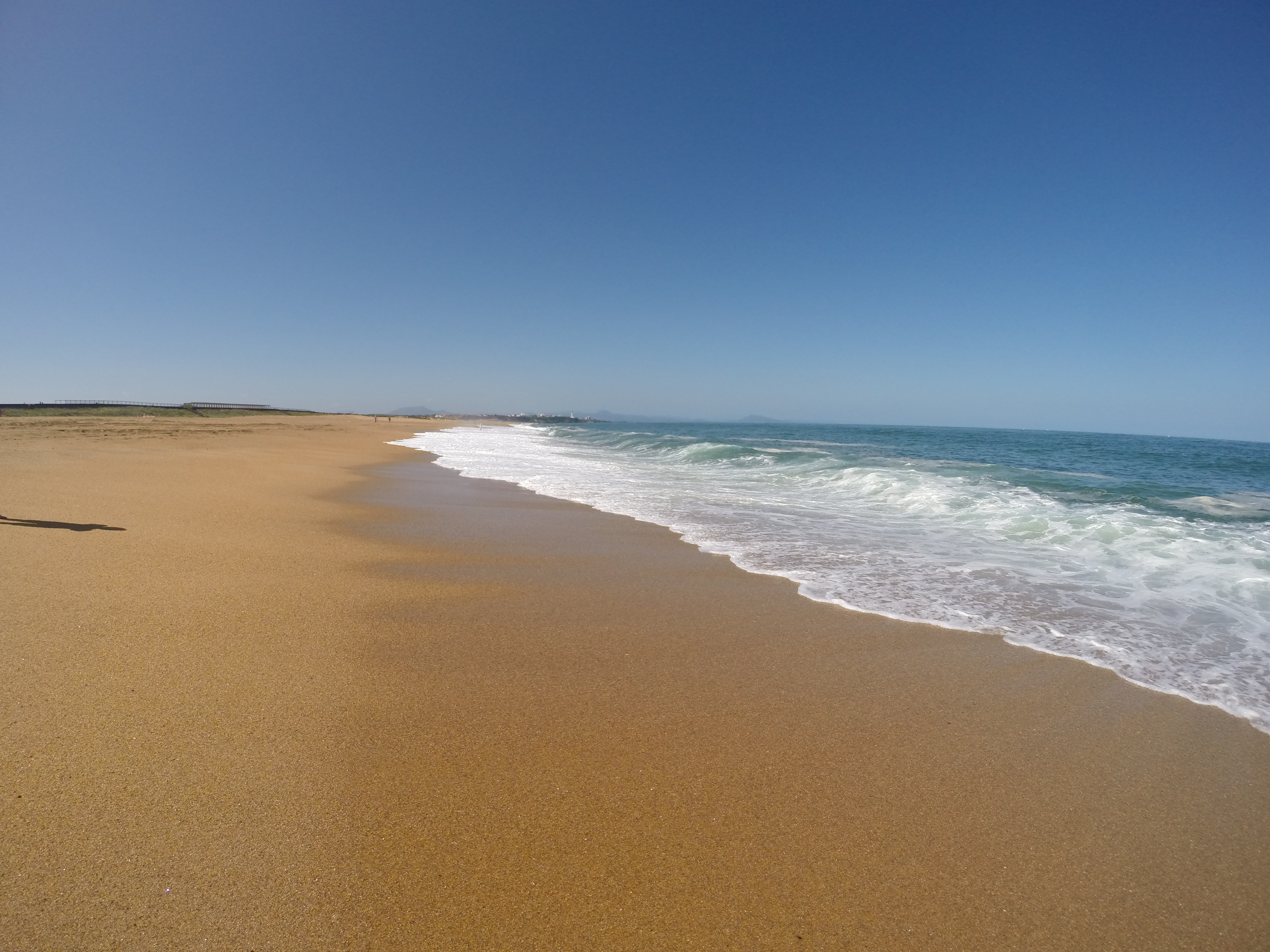 Anglet - Plage des cavaliers en juin 2014